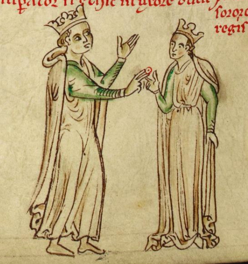 Svatba Isabely Anglické a Fridrciha II. Štaufského